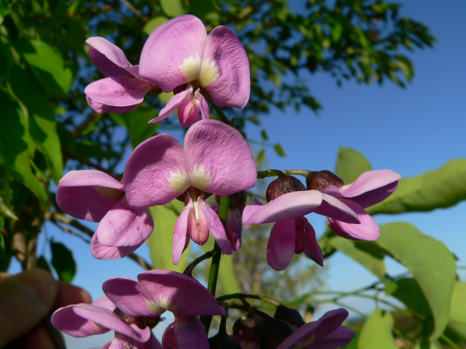 Lonchocarpus punctatus Kunth, racème, Guadeloupe